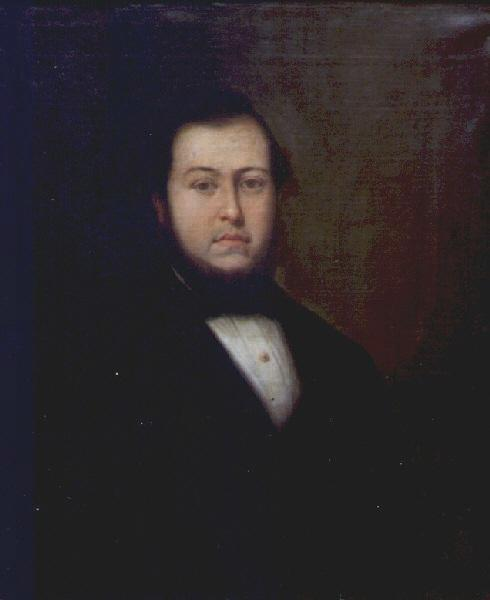 Retrato de un caballero desconocido.